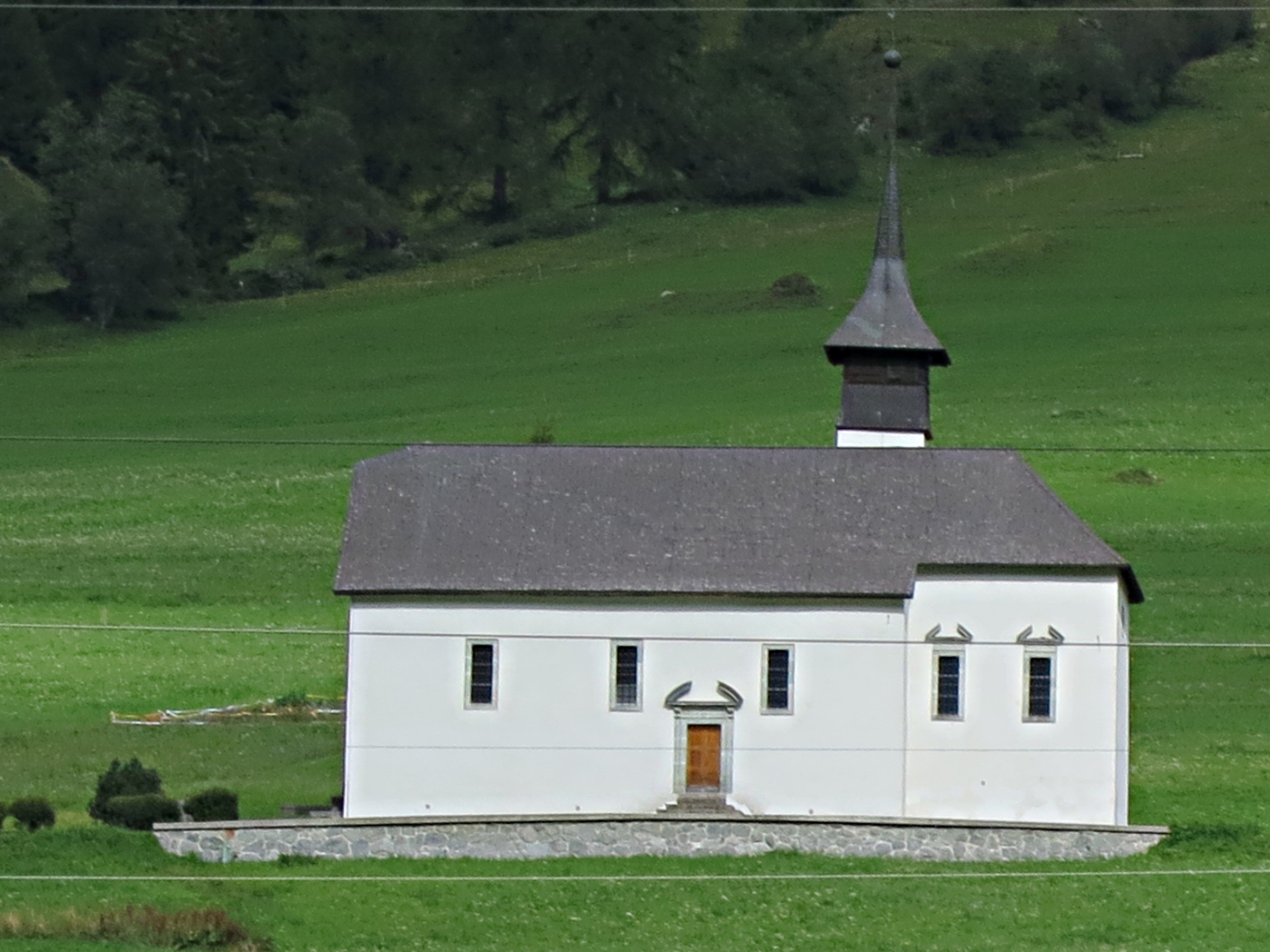 Kapelle Mutter Gottes, Ritzingen VS, Schweiz